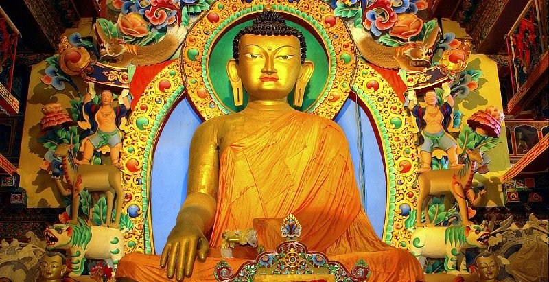 Buddha icon in Twang, India